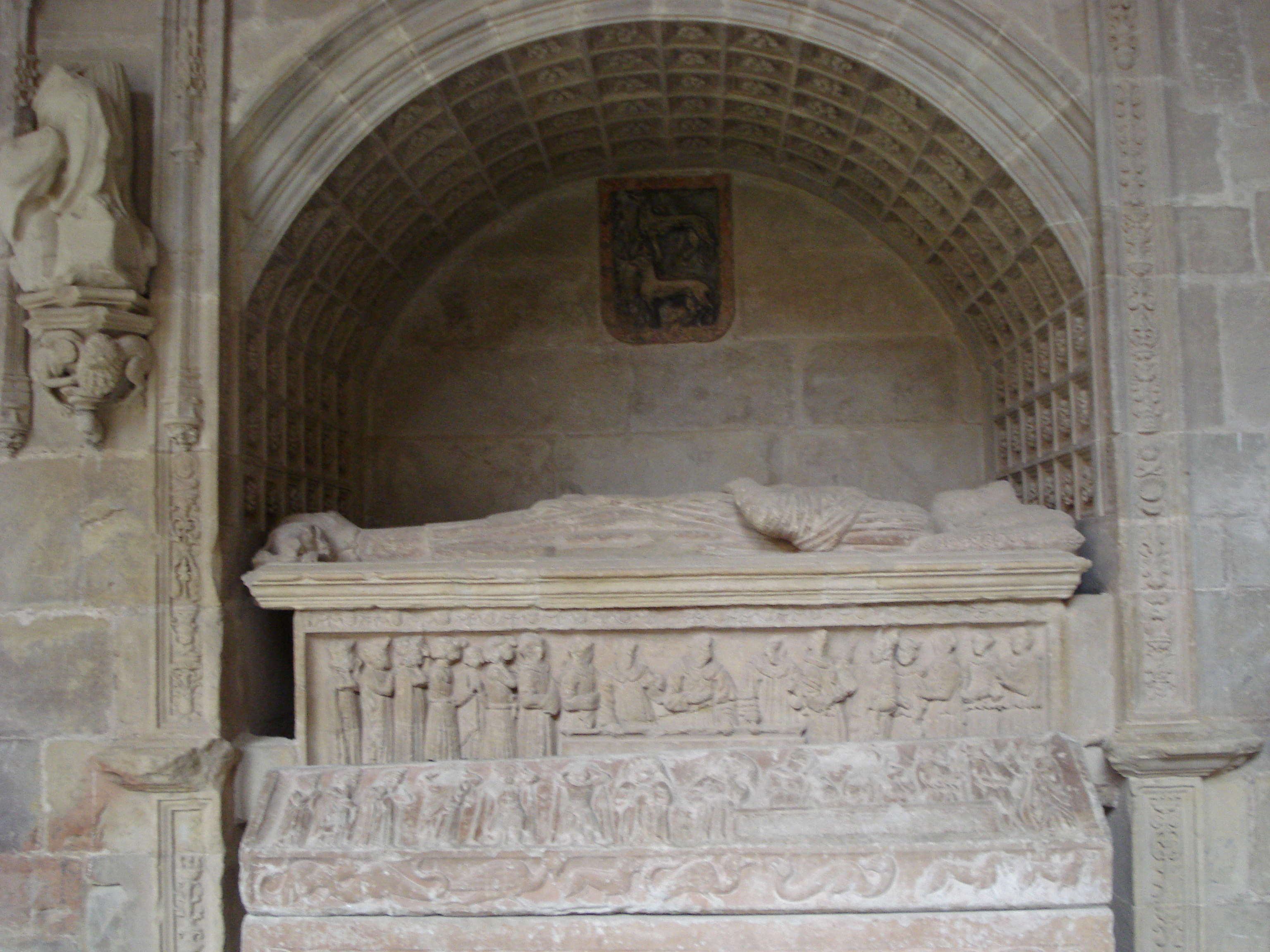 Sepulcro de don Diego López II de Haro en el claustro de los caballeros de Santa María la Real de Nájera ( La Rioja )